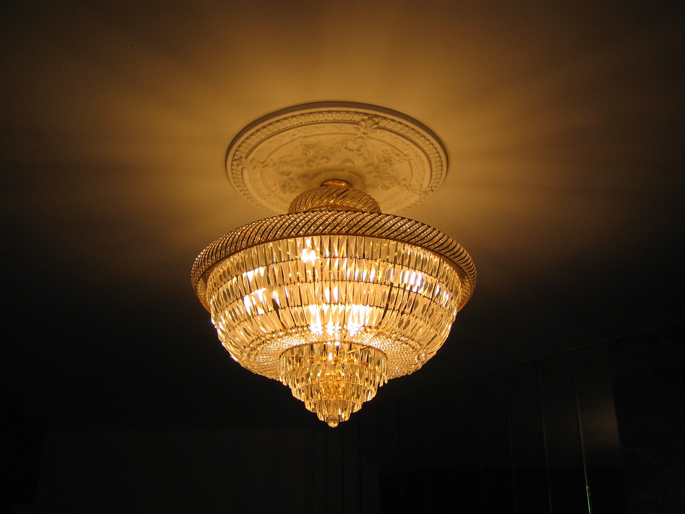 A lamp.